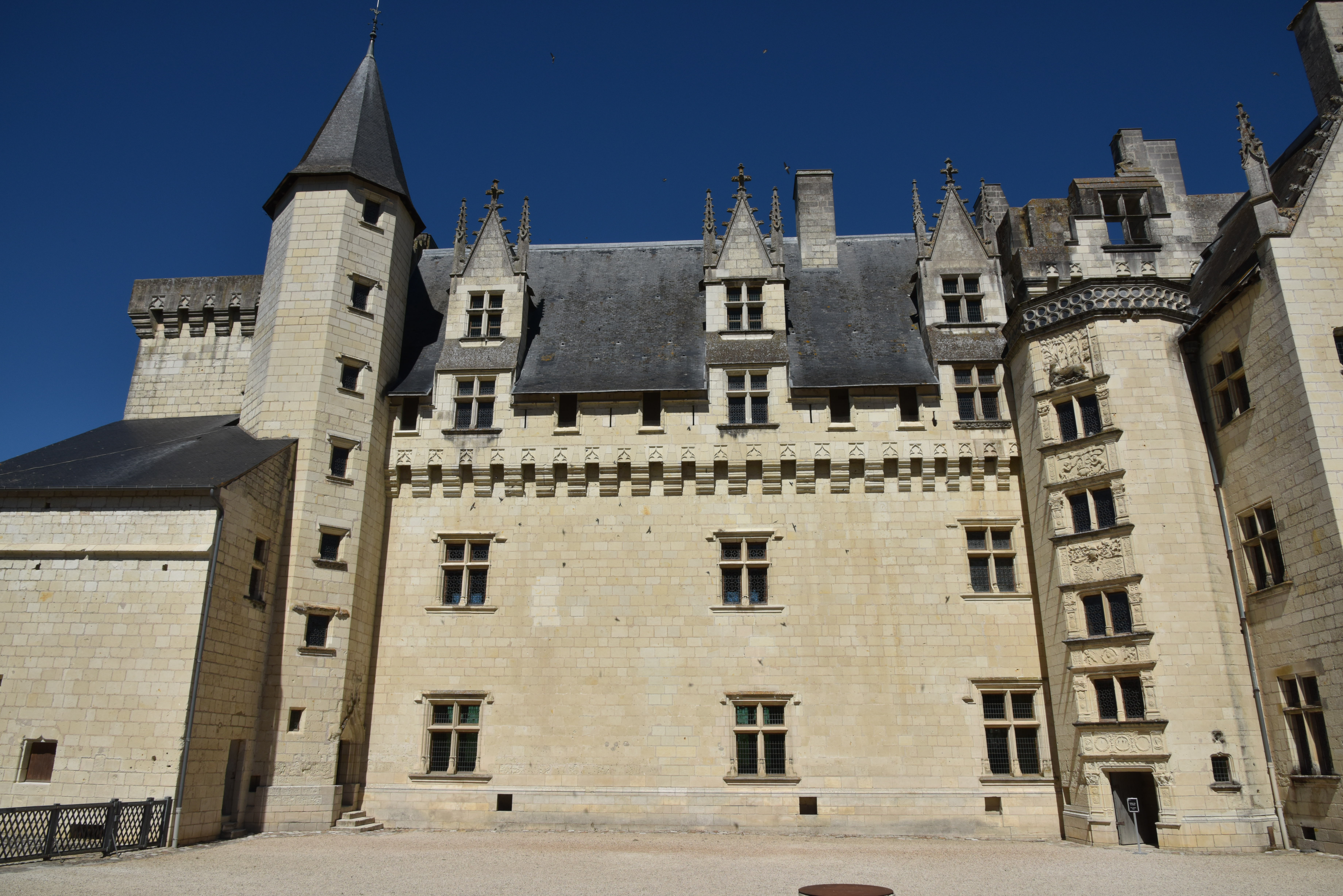 Chateau de montsoreau musee d'art contemporain France Val de Loire . Collection Philippe Méaille. Art conceptuel. Collectif Art & Language.